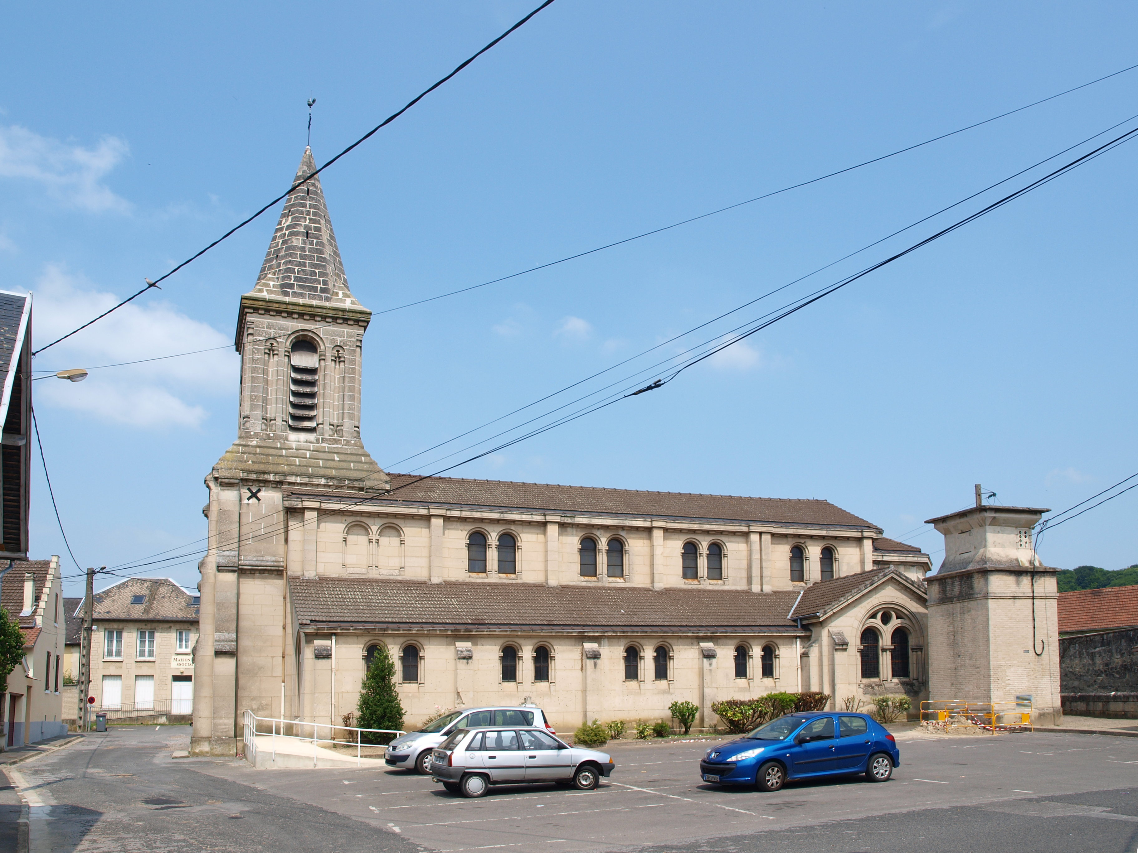 Crouy (Aisne, France) ; église